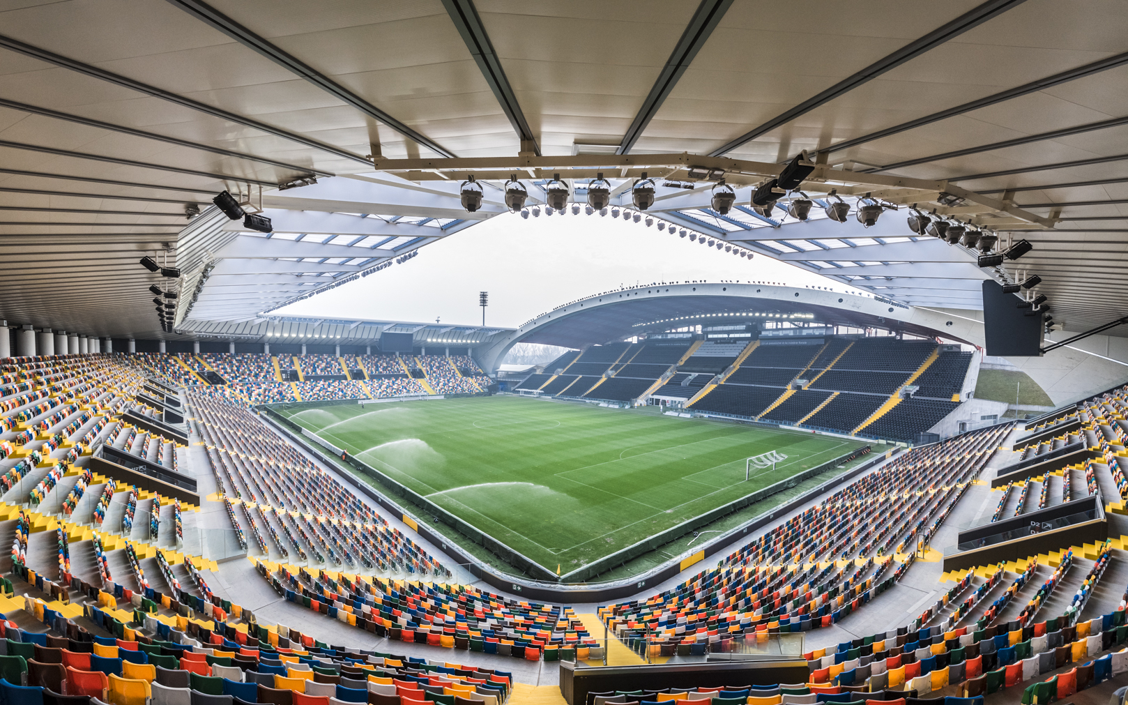 Interno dello Stadio Friuli-Dacia Arena di Udine nella nuova configurazione, dopo i lavori di ristrutturazione del triennio 2013-2015. Foto di Matteo Favi.